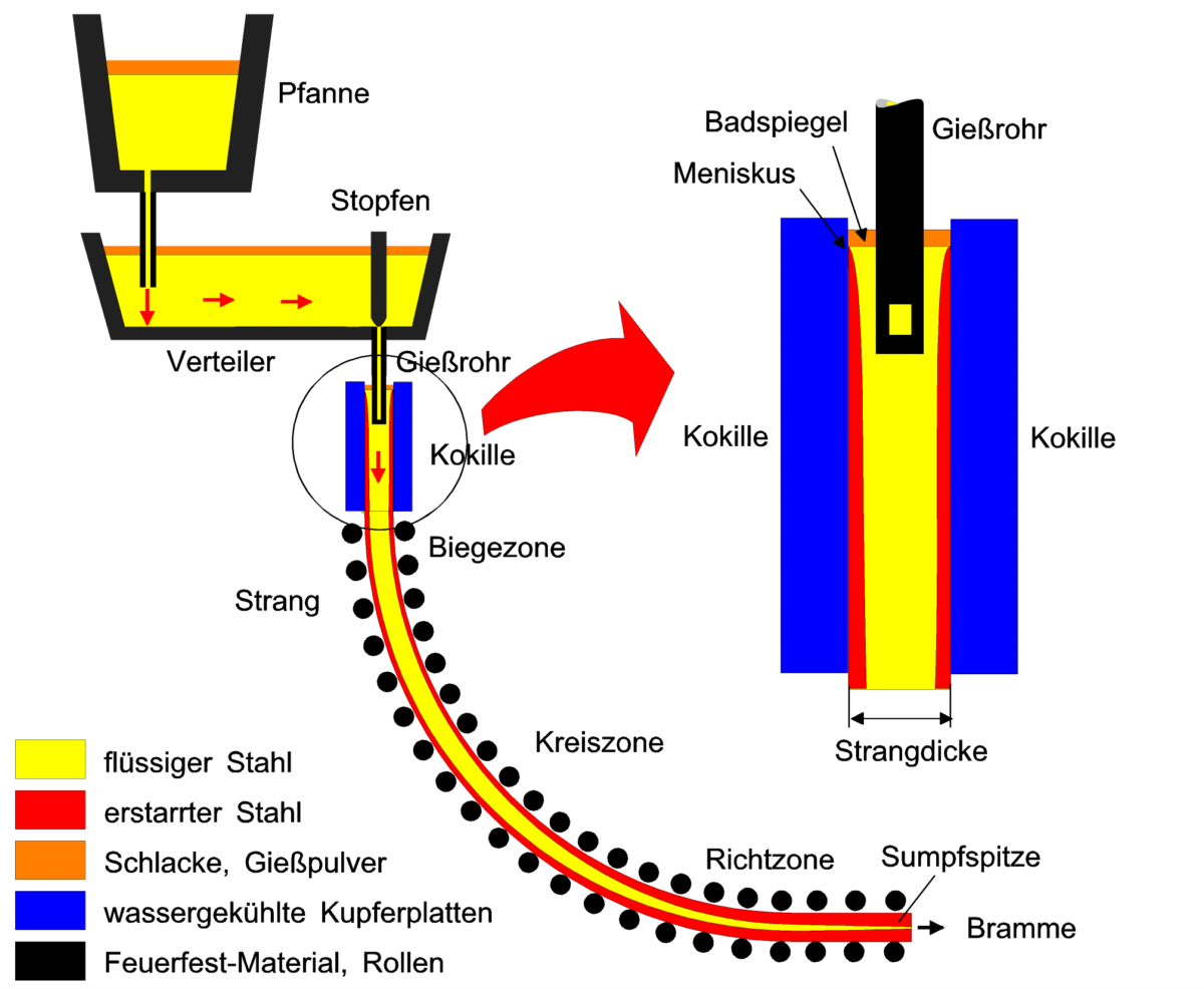 Prinzip des Stranggießens